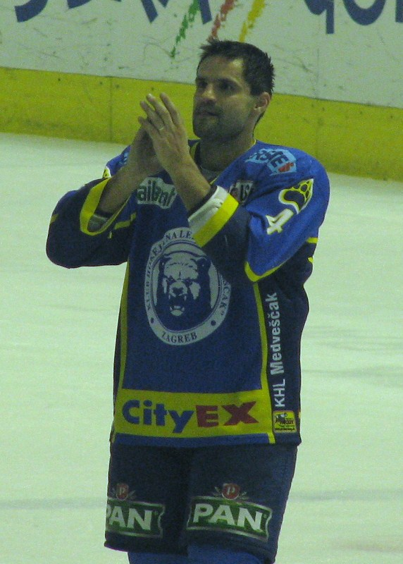 Miroslav Brumerčik